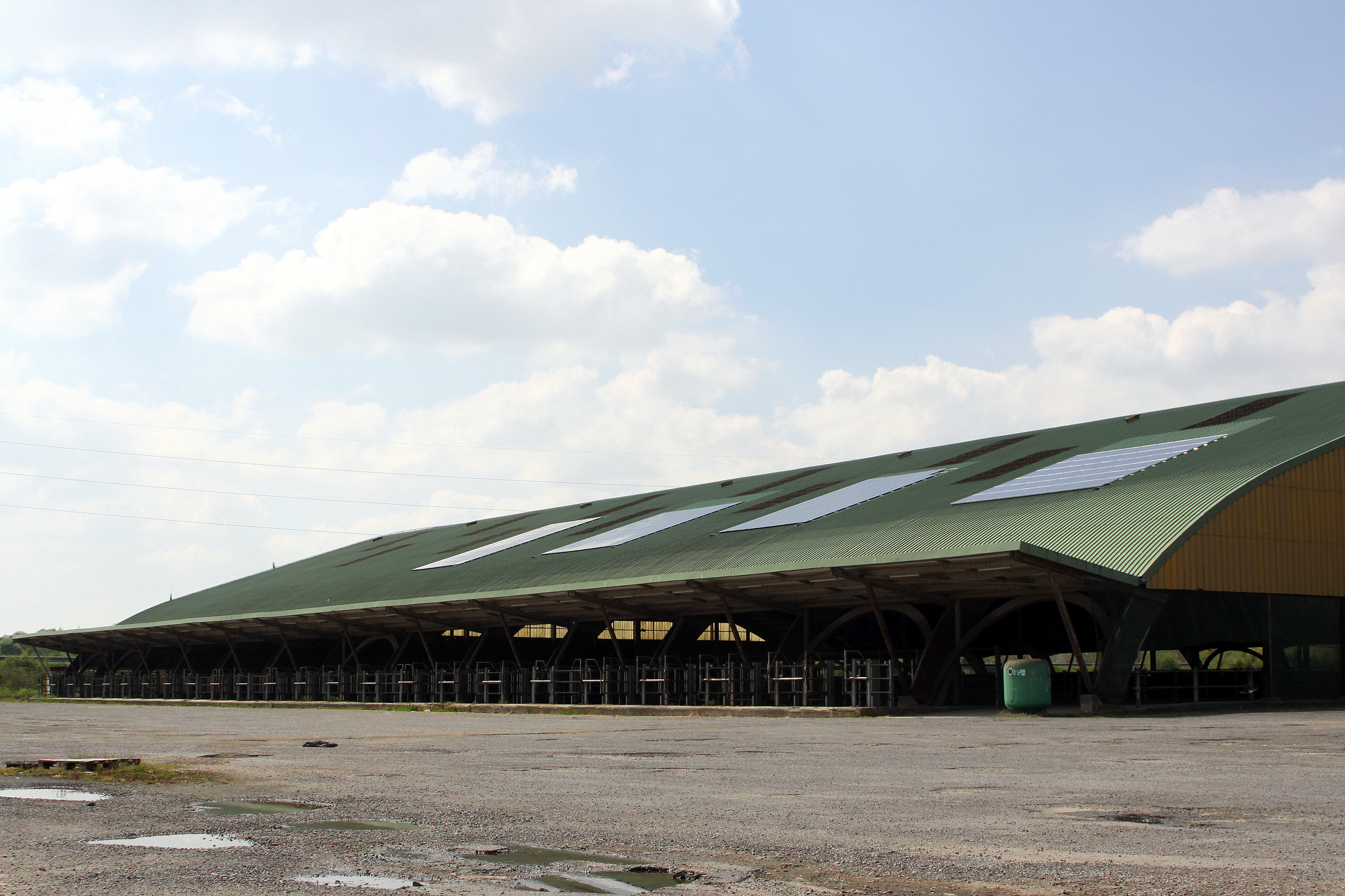 Véihalen zu Rethel